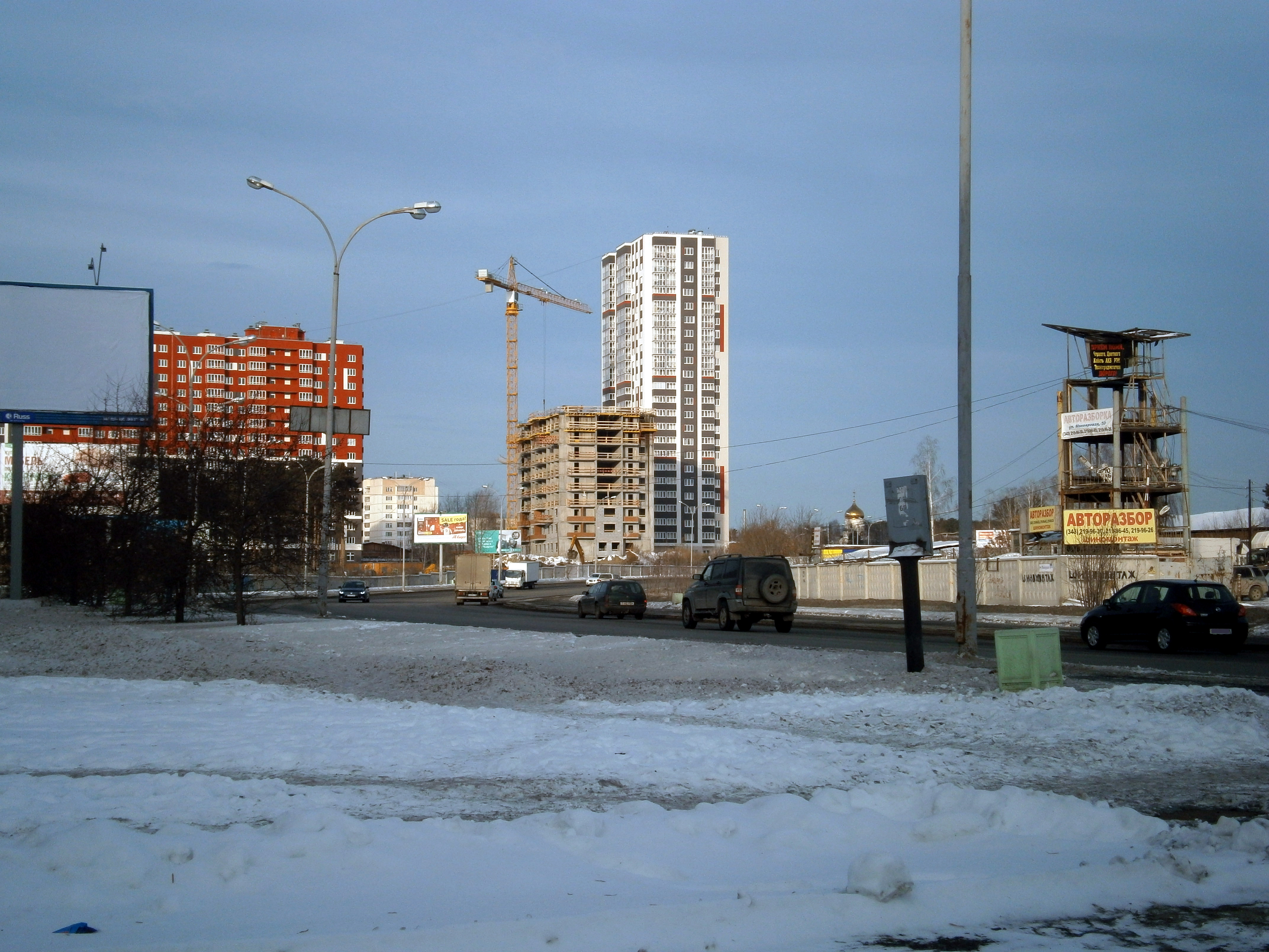 Строительство домов по улице Таватуйская